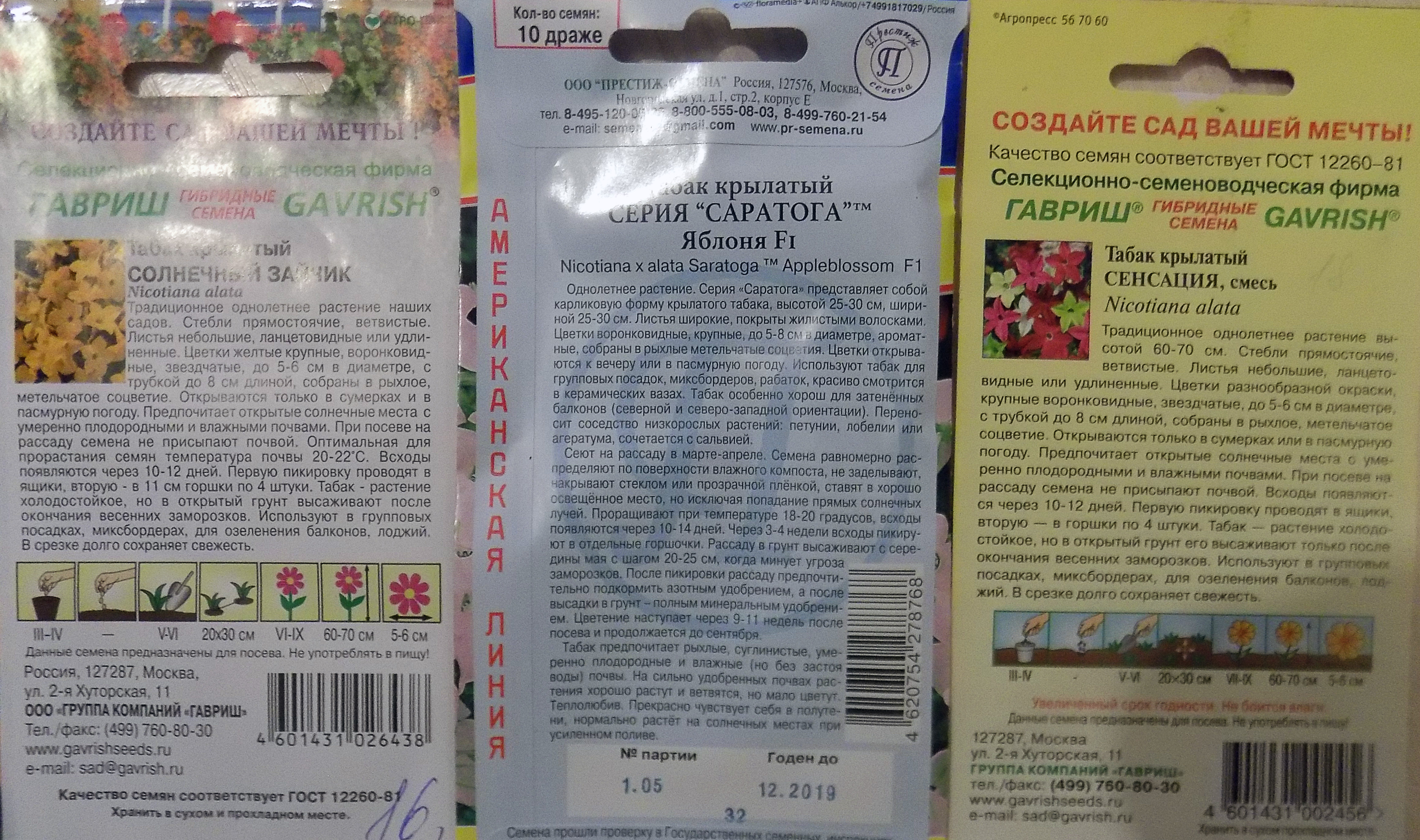 Семена декоративного табака крылатого